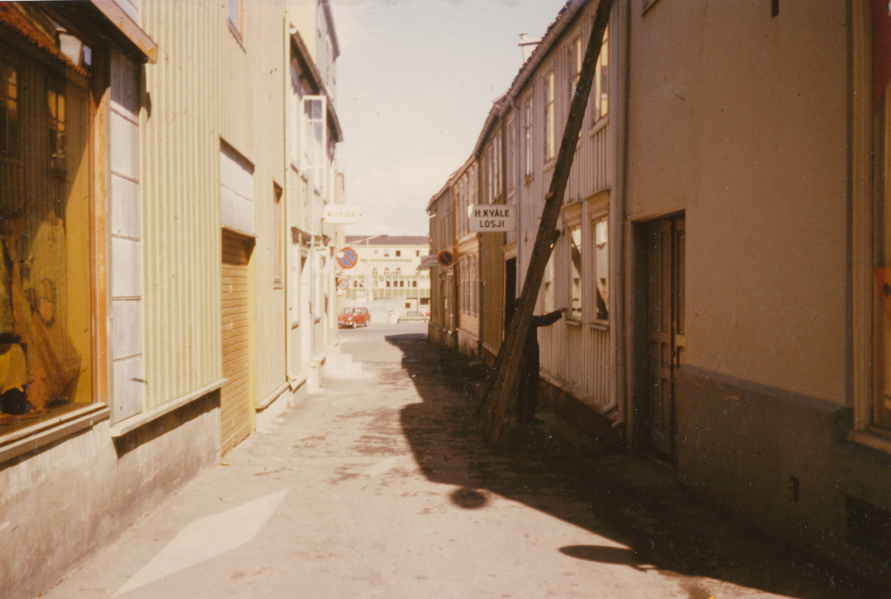 Arkivreferanse / Archive reference: Tor.H41.B27.F2006 Gaubekveita ligger mellom Carl Johans gate og Fjordgata med et tverrløp vestover til Nordre gate. Veita er oppkalt etter bekken Gautbekken.